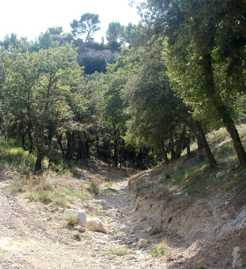 Le Jarret (à sec) au pied des ruines du château de Ners.